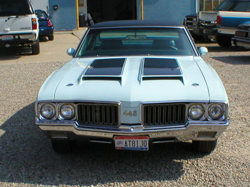 1970 Oldsmobile 442 coupe